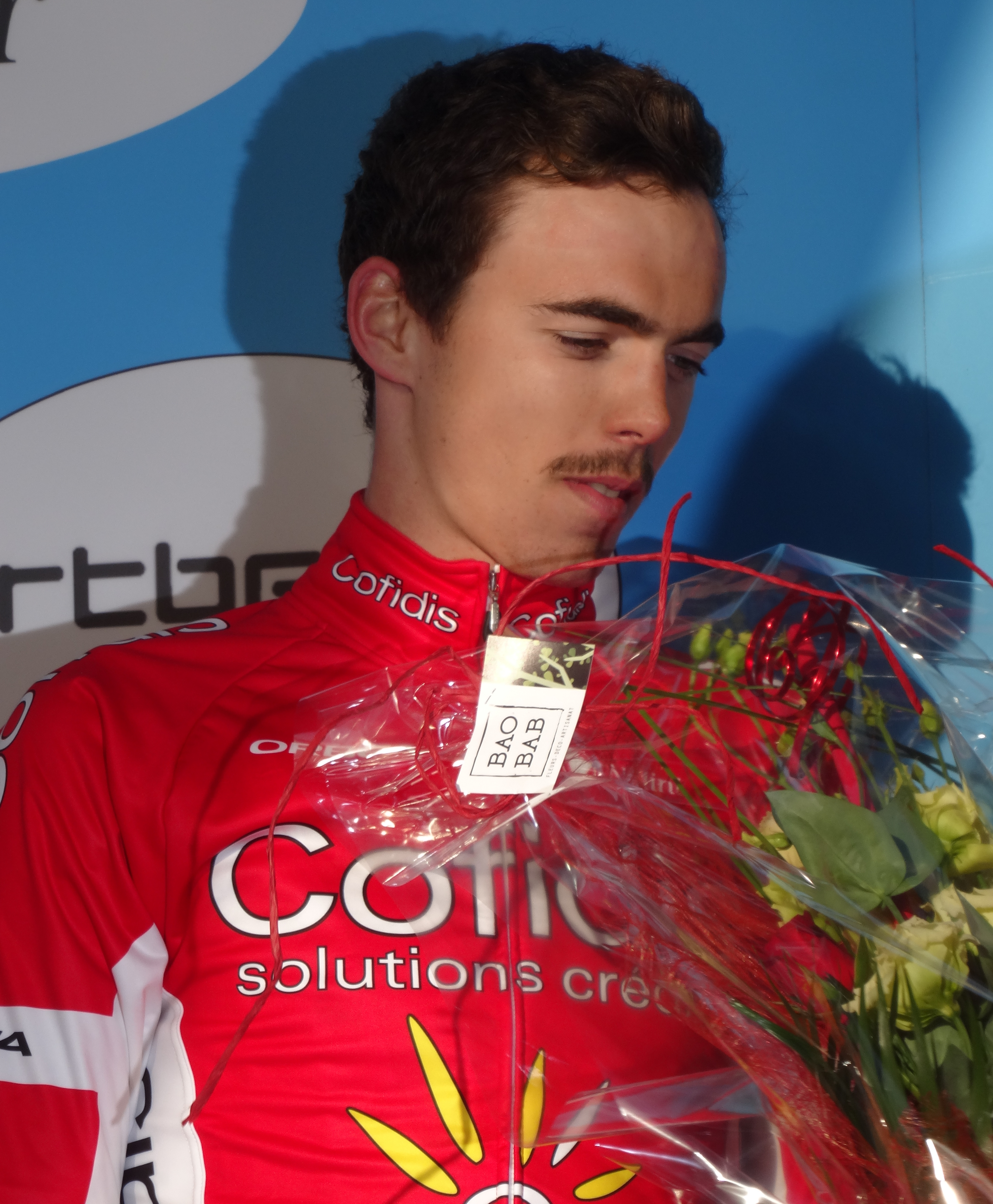 Reportage réalisé le mercredi 4 mars à l'occasion de l'arrivée du Samyn des Dames 2015 et du Samyn 2015 à Dour, Belgique.